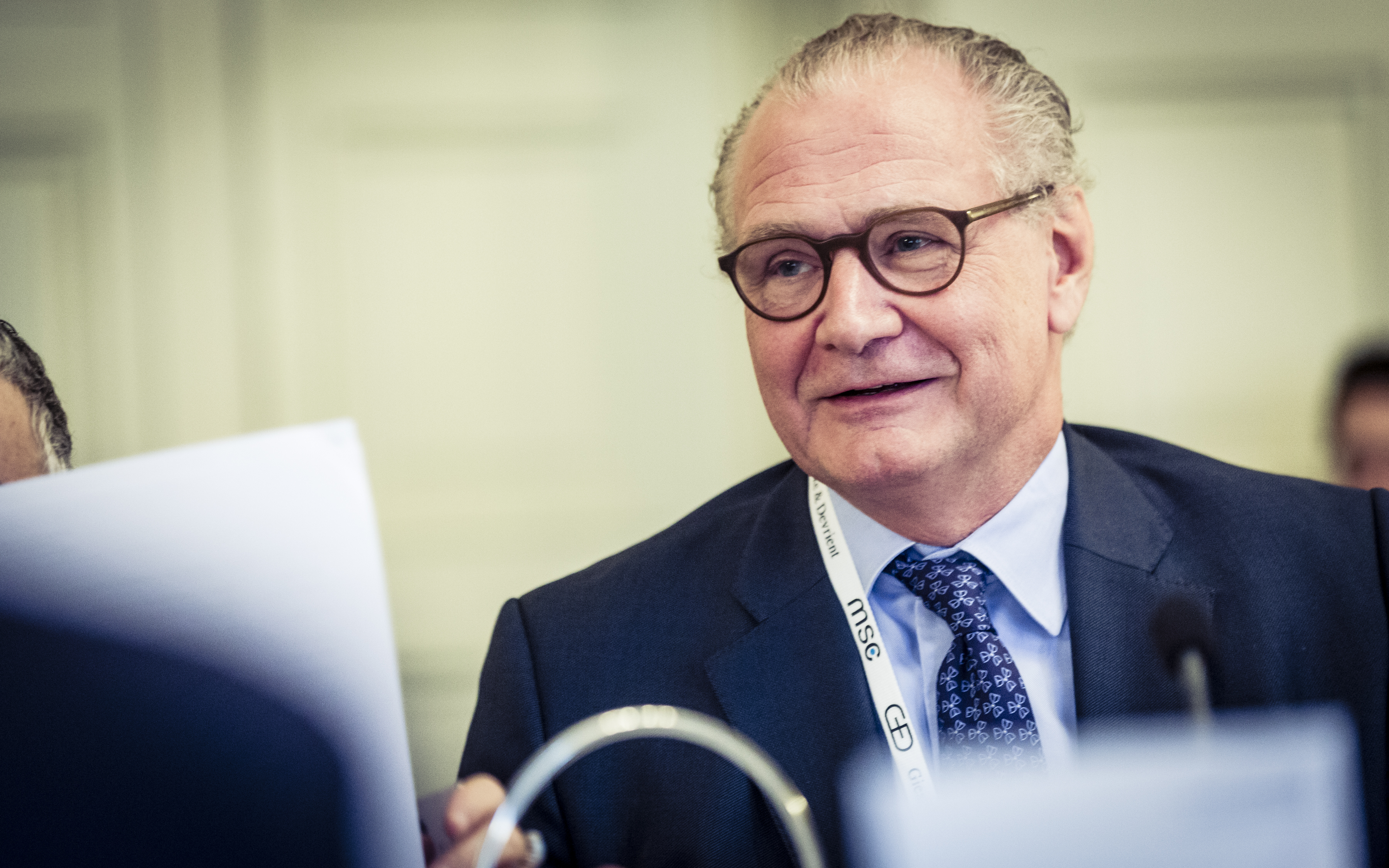 Stefan Oschmann während der Münchner Sicherheitskonferenz 2017